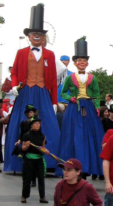 Ham (Somme, France) - Animation festive au centre-ville, un dimanche de printemps. Les géants Anatole et Grand-Père Guernouillard ont descendu la rue du Château et sont à l'angle de la rue de Noyon. .